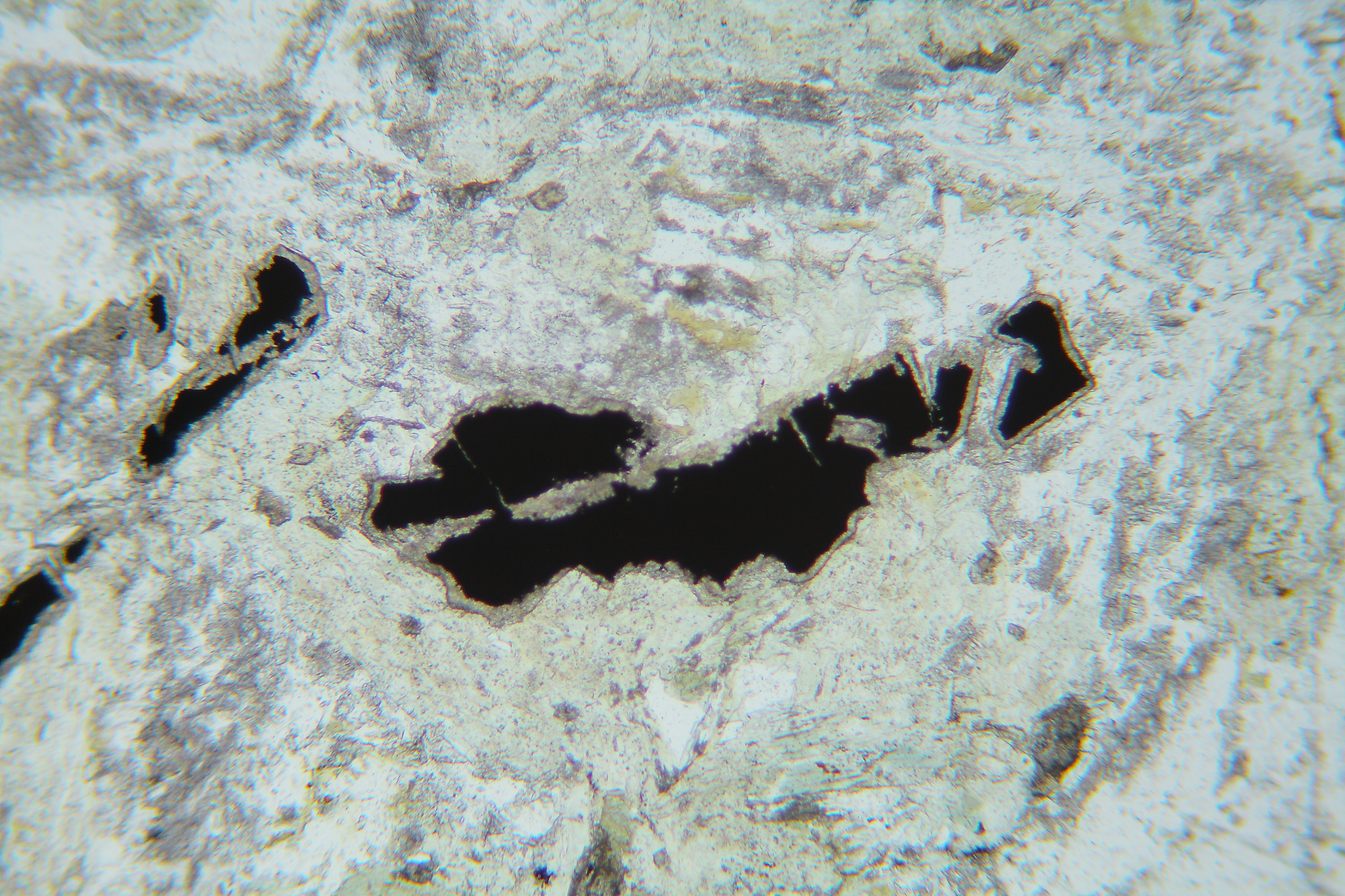 Leukoxen als Ummantelung von Ilmenit in einem alterierten Andesit (Dünnschliff, LPL)